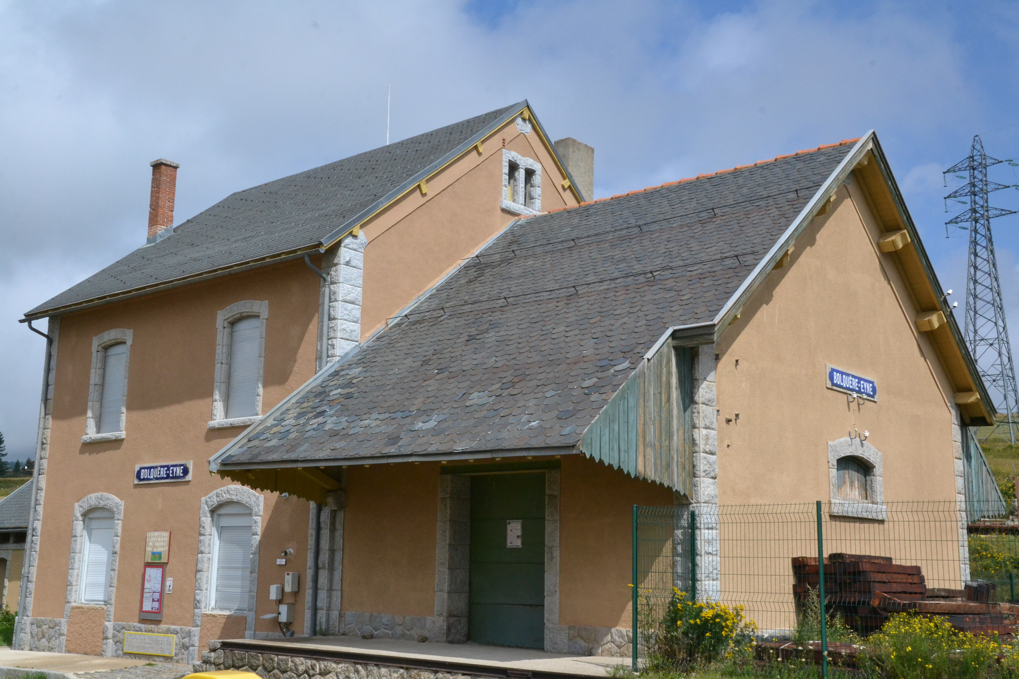 Gare de Bolquère - Eyne, ligne de Cerdagne (commune de Bolquère, Pyrénées-Orientales, France).